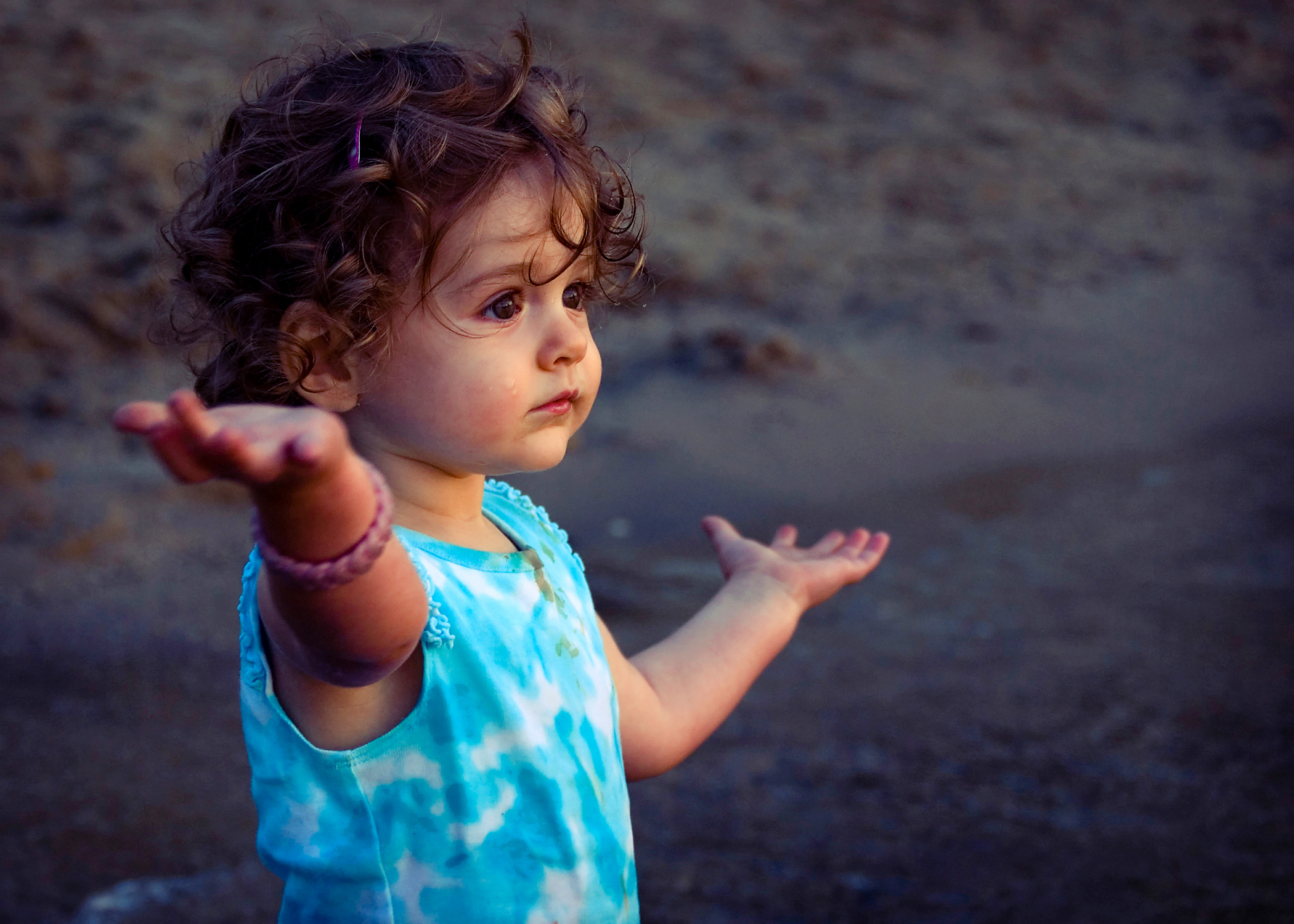 2 year-old girl.